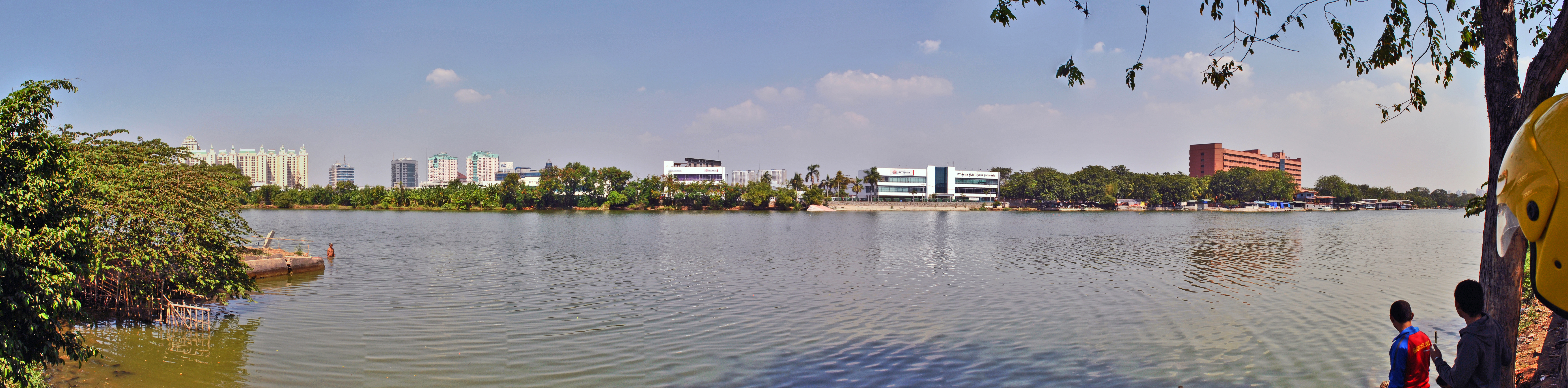 Danau Sunter